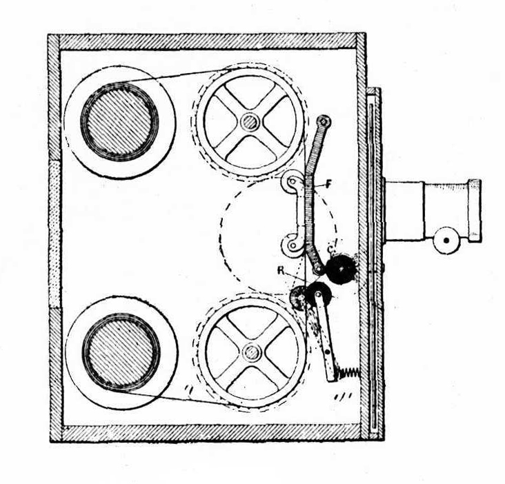 Birt Acres (1854 - 1918), Kinetic Camera Zeitgenössische Illustration, Kontruktionszeichnung (1895)